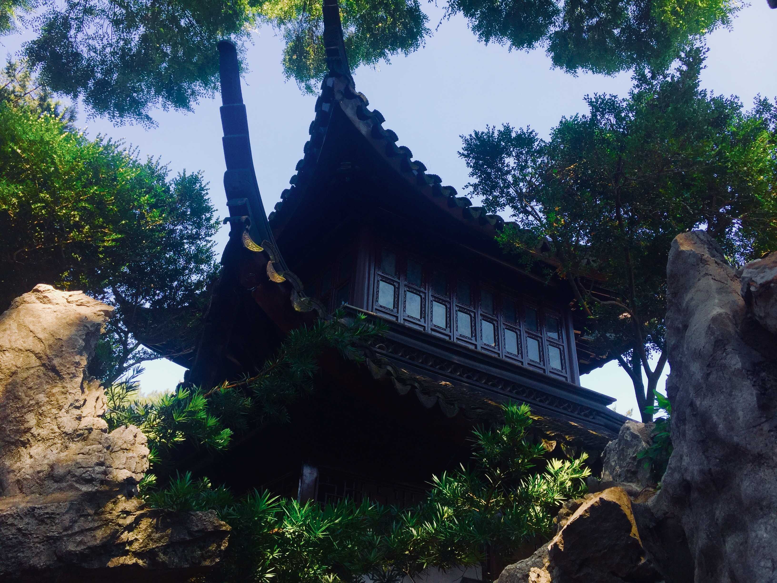 中文（中国大陆）: 狮子林卧云亭